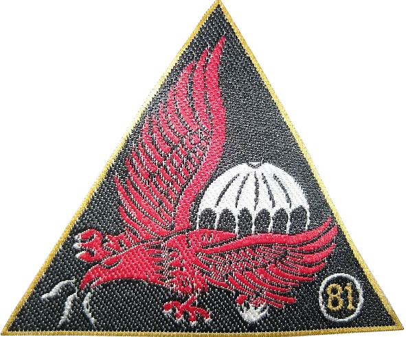 The insignia of 81st Airborne Commando Battalion, used since 1968 to 1975.